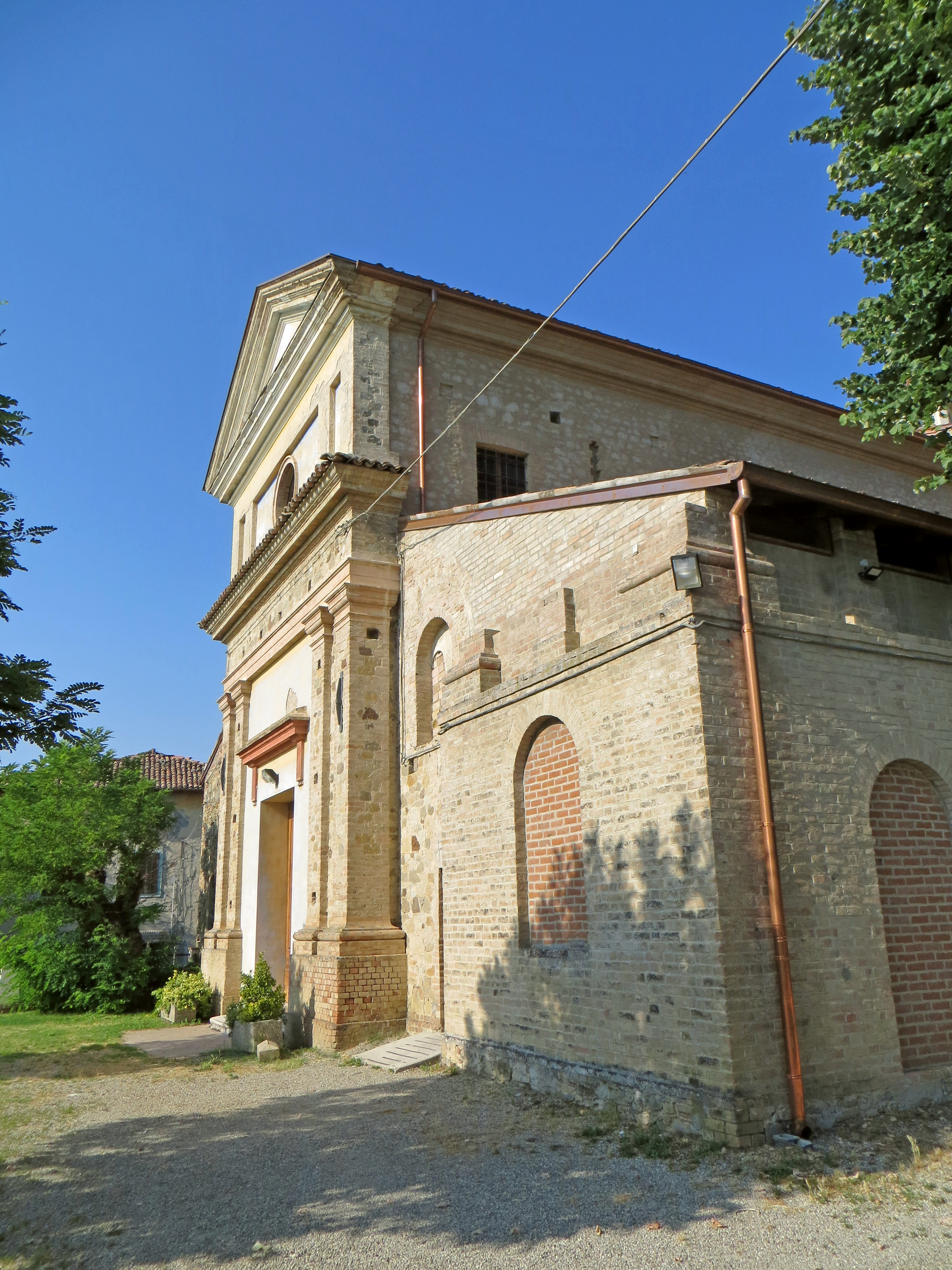 Chiesa della Purificazione di Maria Vergine (Santa Maria del Piano, Lesignano de' Bagni) - facciata